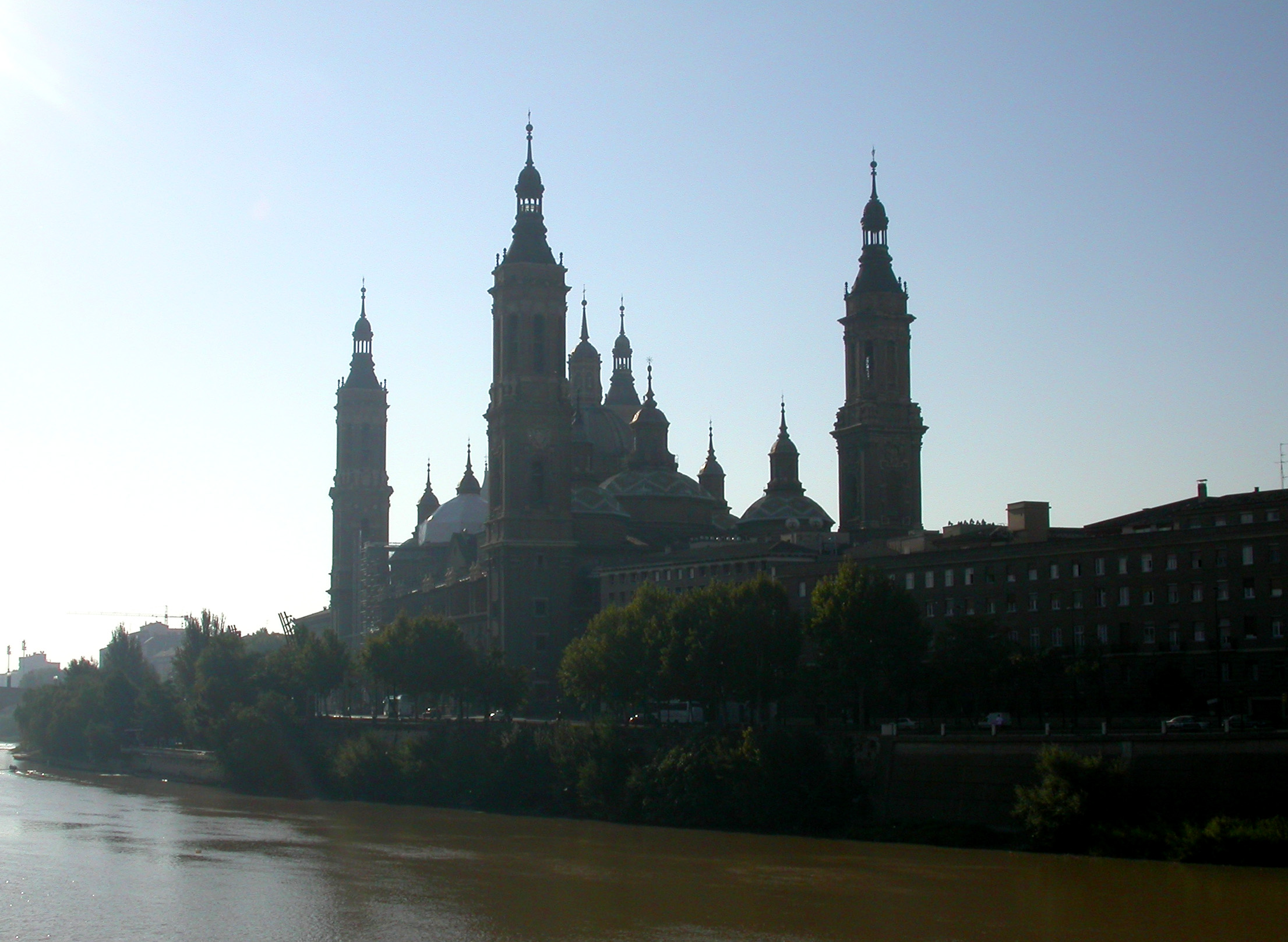 Ardeaglais Zaragoza